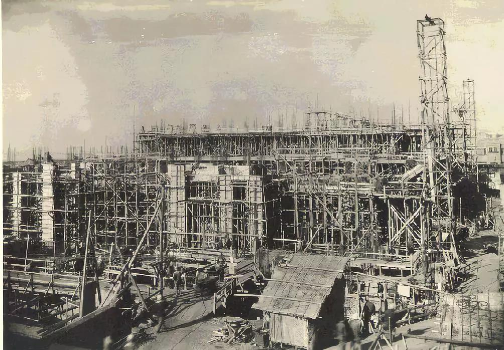 青岛发电厂乙站扩建工程新建主厂房施工现场